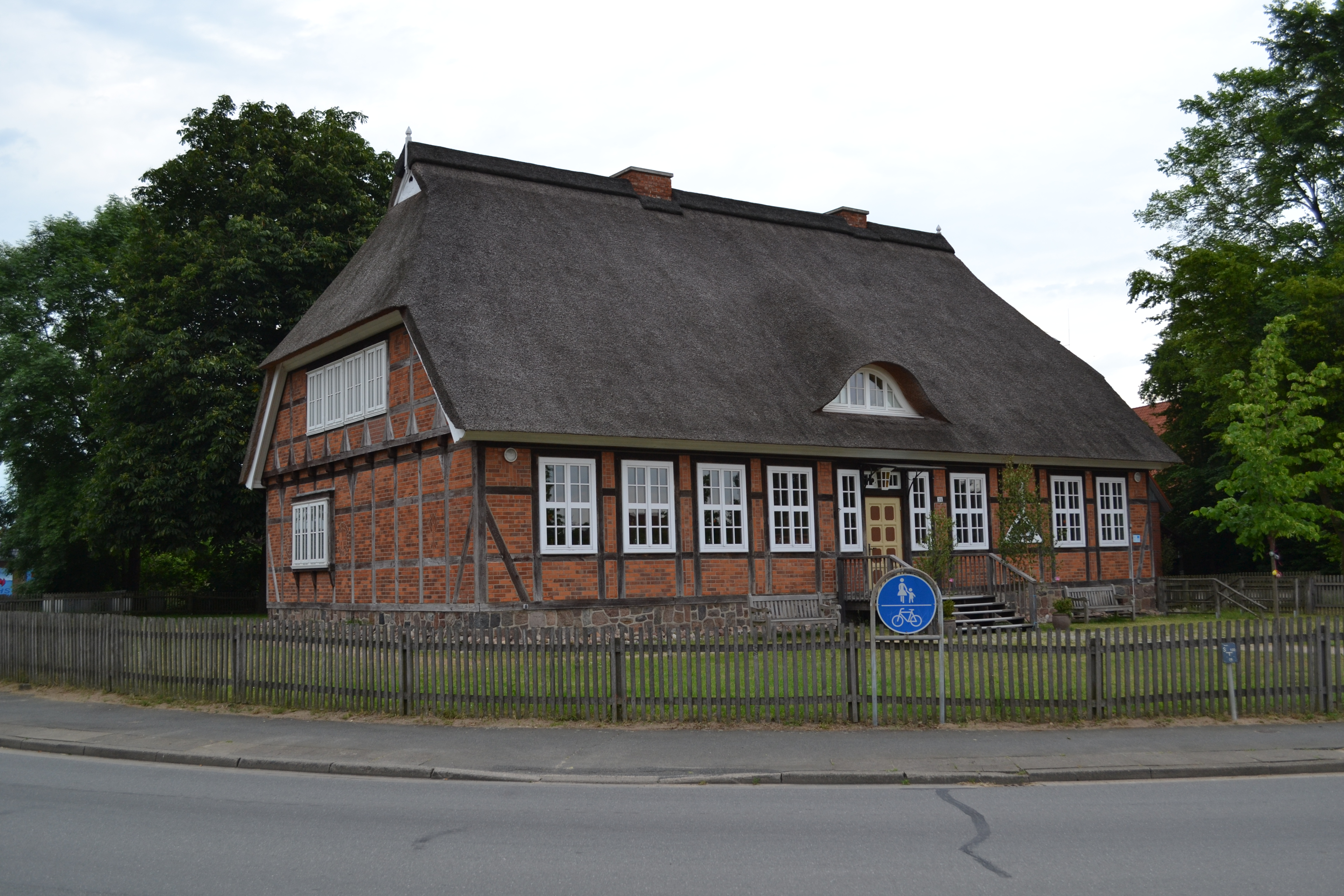 Ehemalige Schule Bütlinger Straße 38